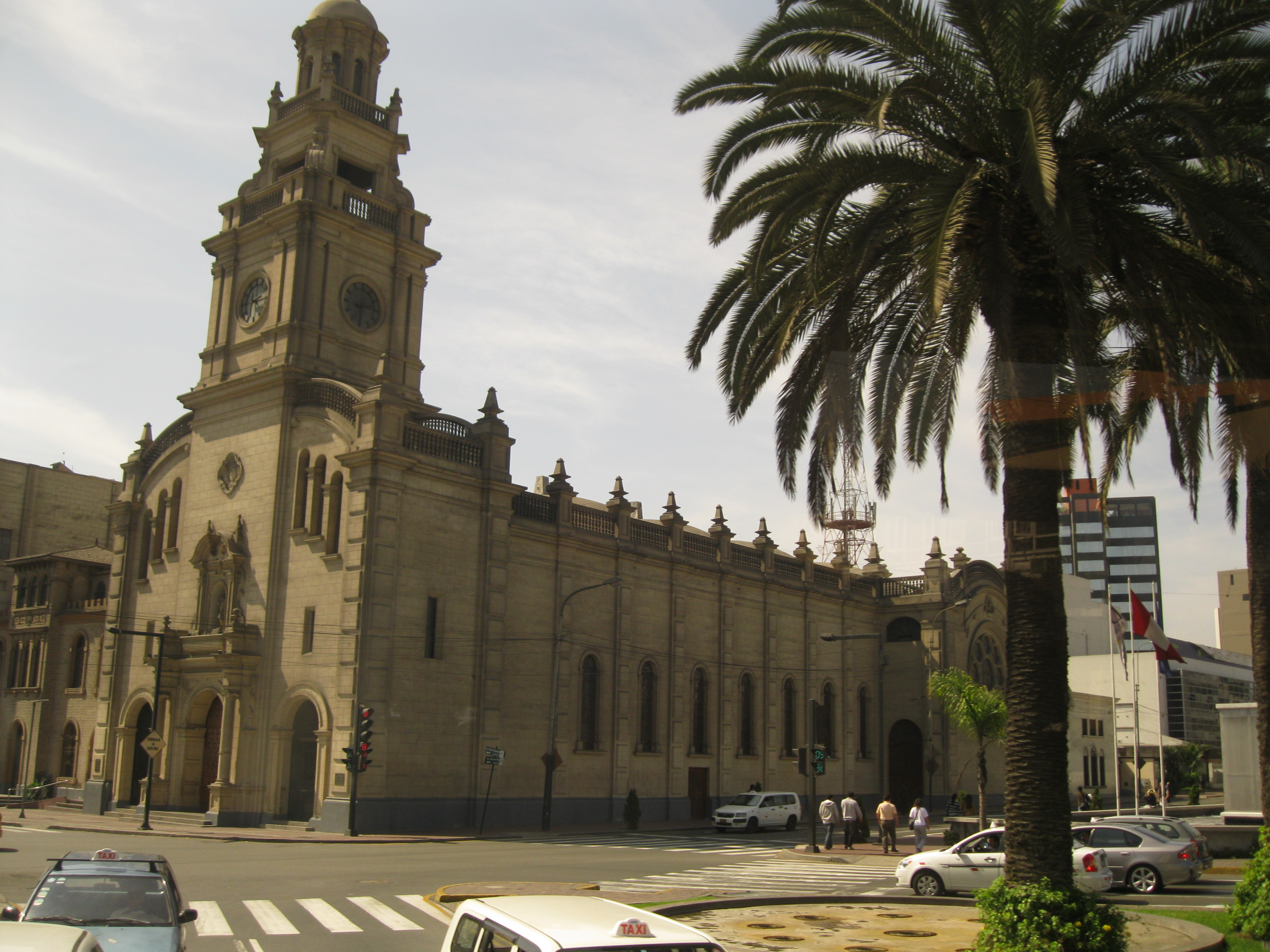 Iglesia de la Virgen del Pilar, San Isidro, Lima